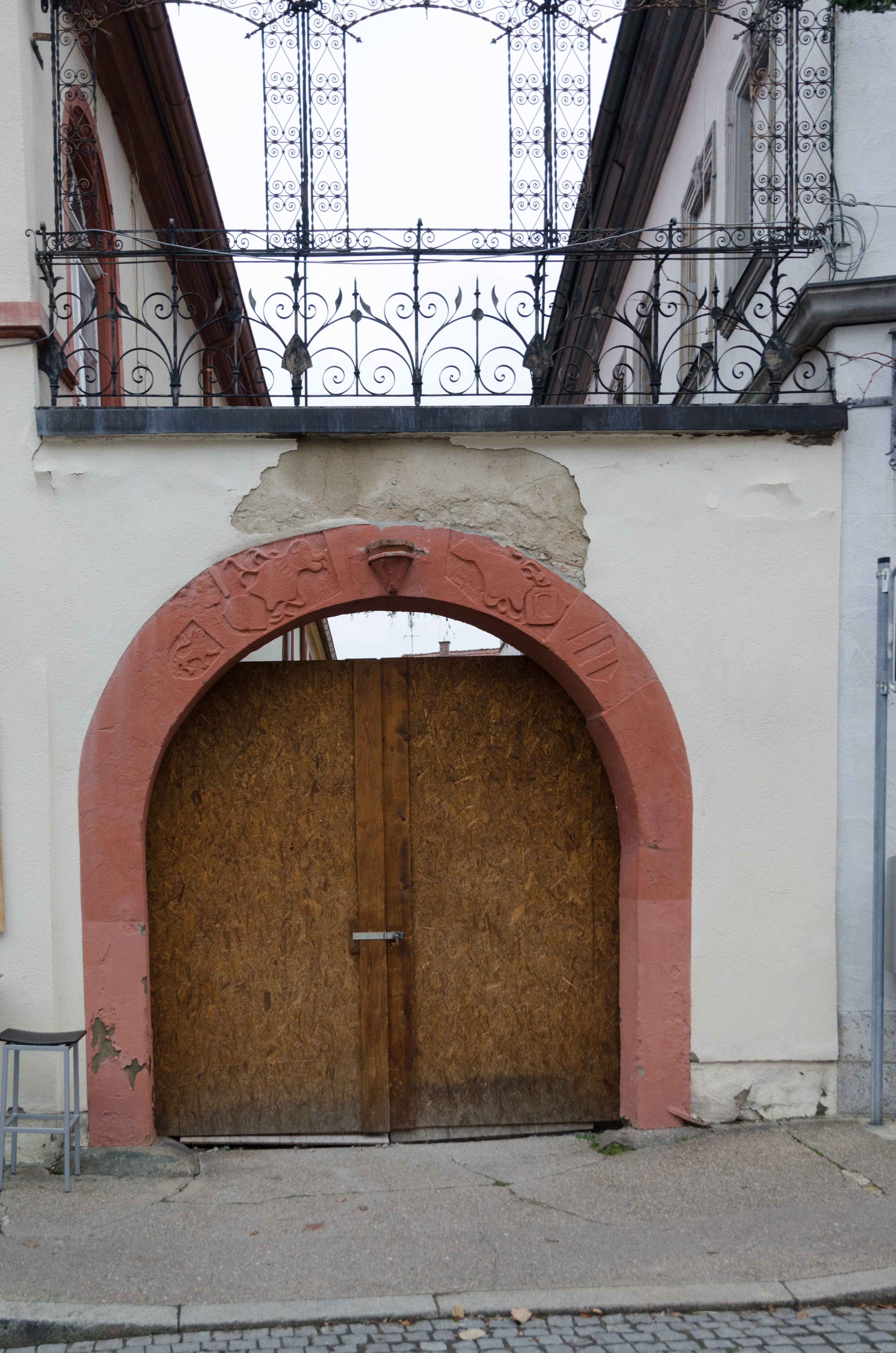 Volkach, Hauptstraße 48